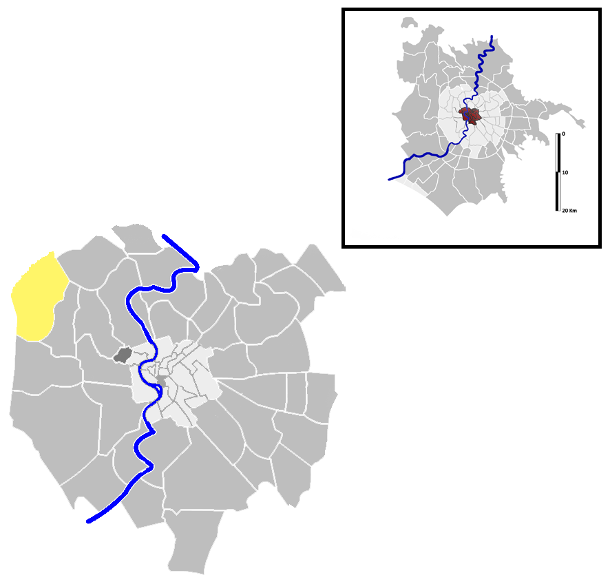 Trionfale